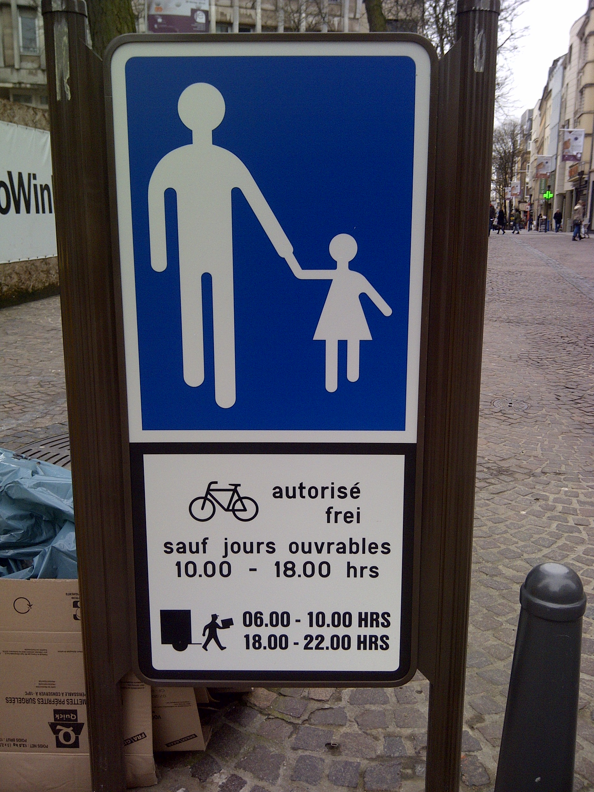 Verkéiersschëld E,27a "Zone piétonne" aus dem lëtzebuerger Code de la Route.